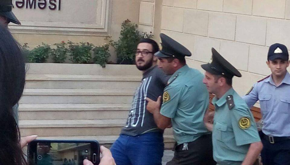 Bayram Məmmədov